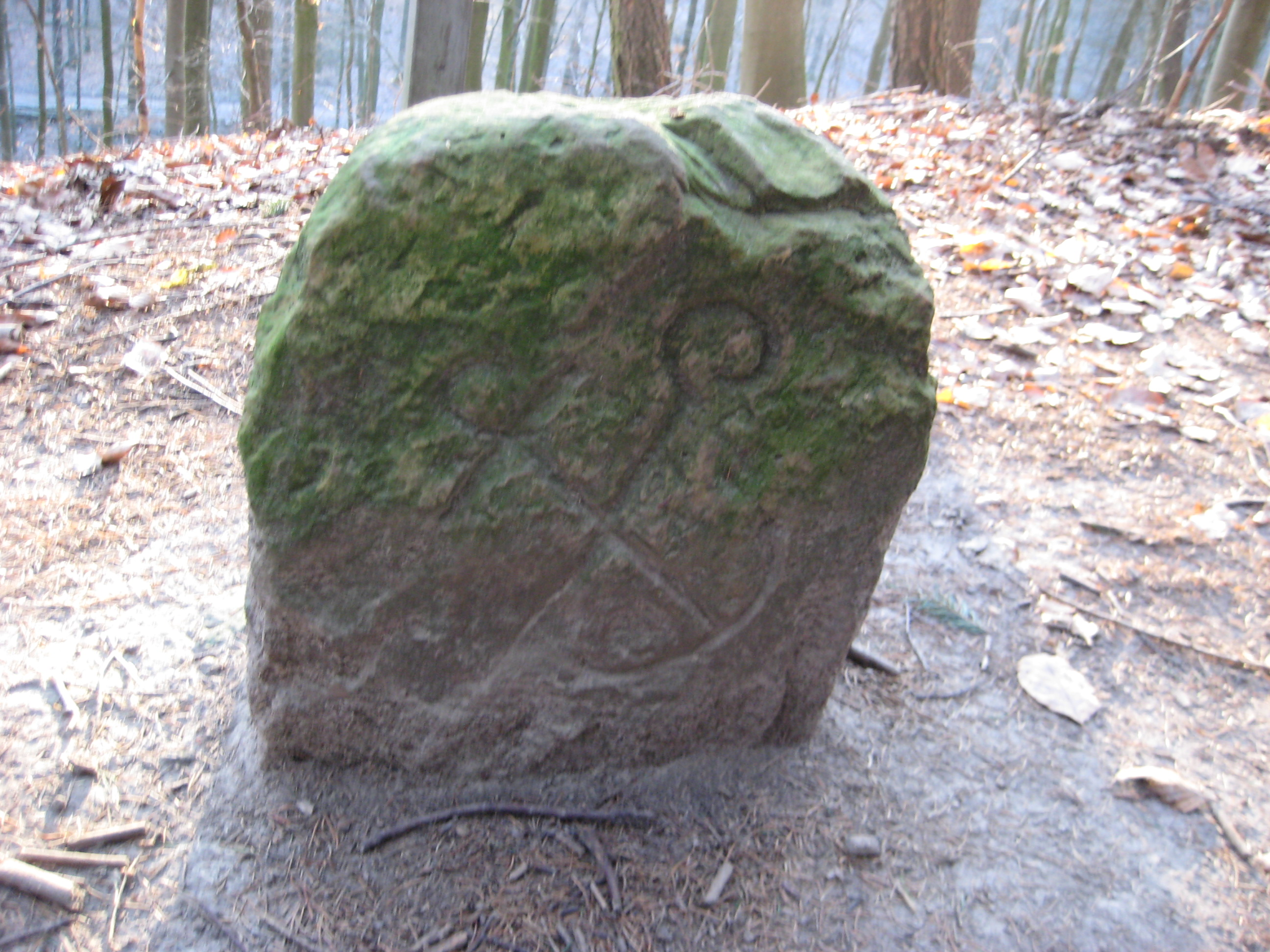 Stein mit den Insignien des Abts des Benediktinerabtei Iburg auf dem Kammweg des Langenberg